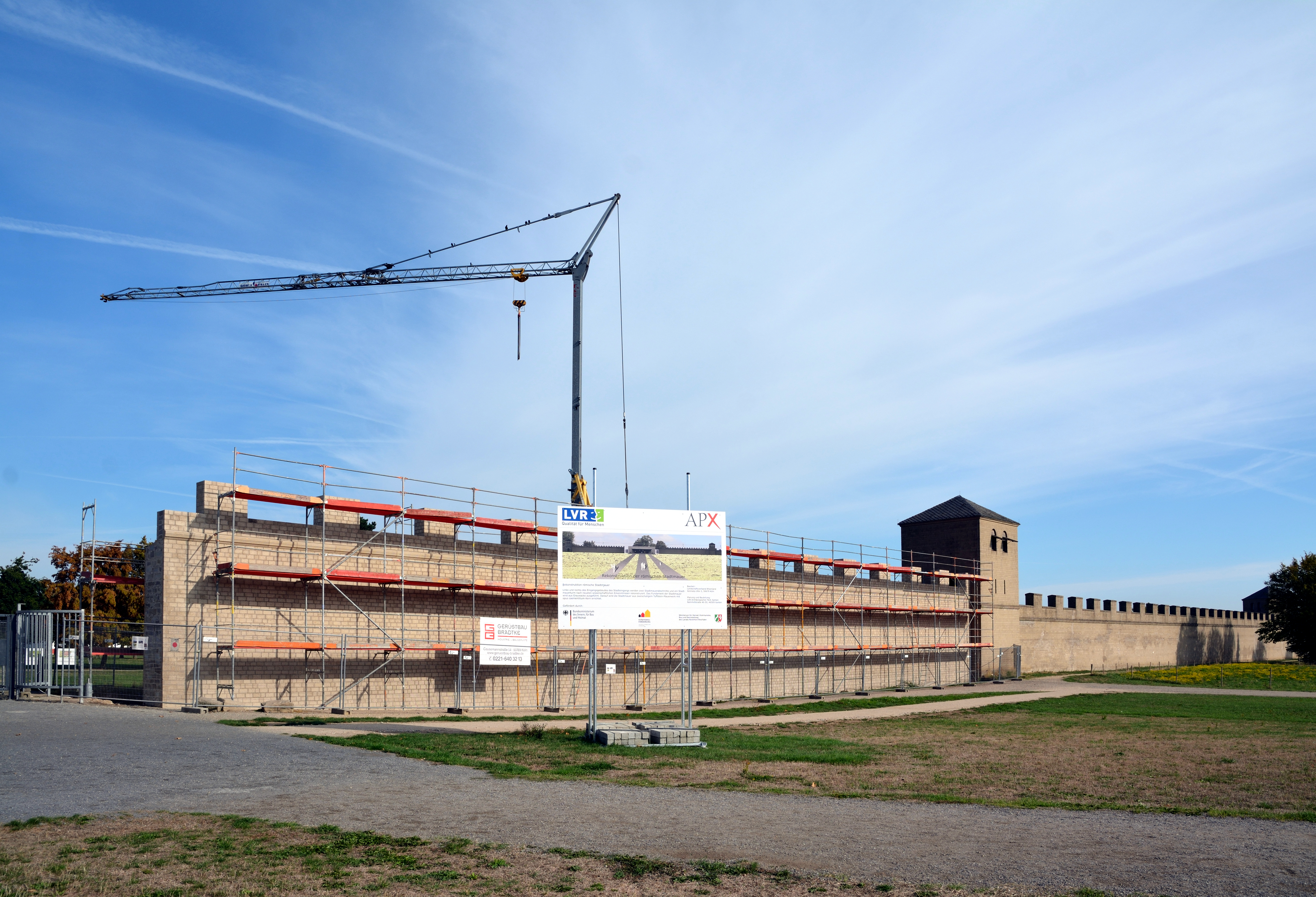 Impressionen aus dem LVR-Archäologischer Park Xanten Hier: Rekonstruktion der Stadtmauer rechts vom Eingangspavillion